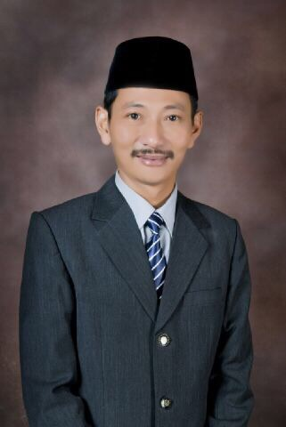 Ir. H. M. Heri Romadhon, MM